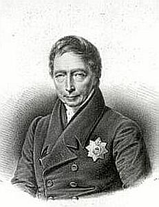 Friedrich von Schuckmann (1755-1834), prussian minister